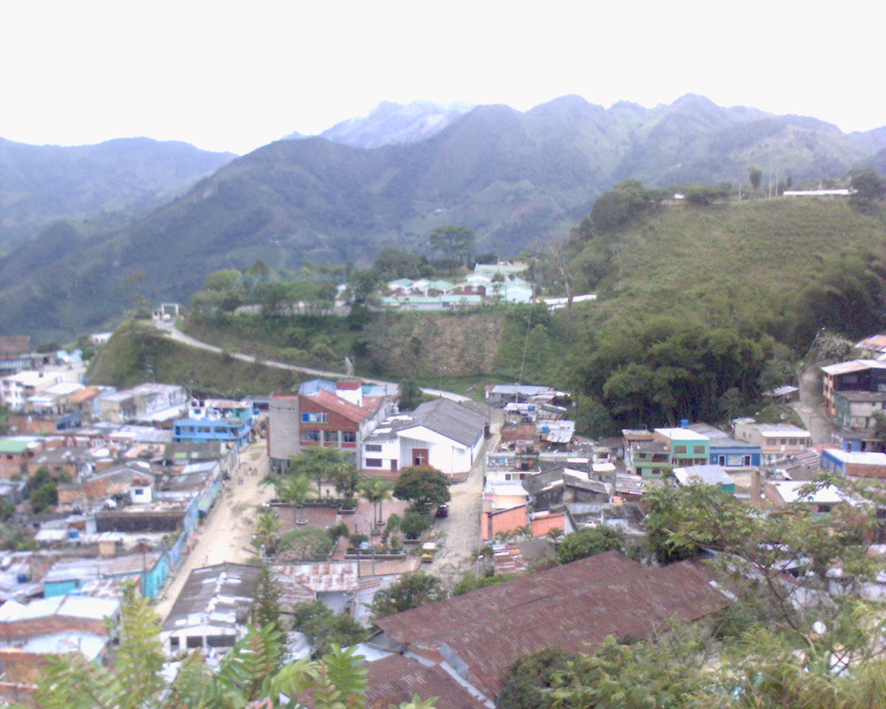 Foto tomada el 10 de abril del 2006